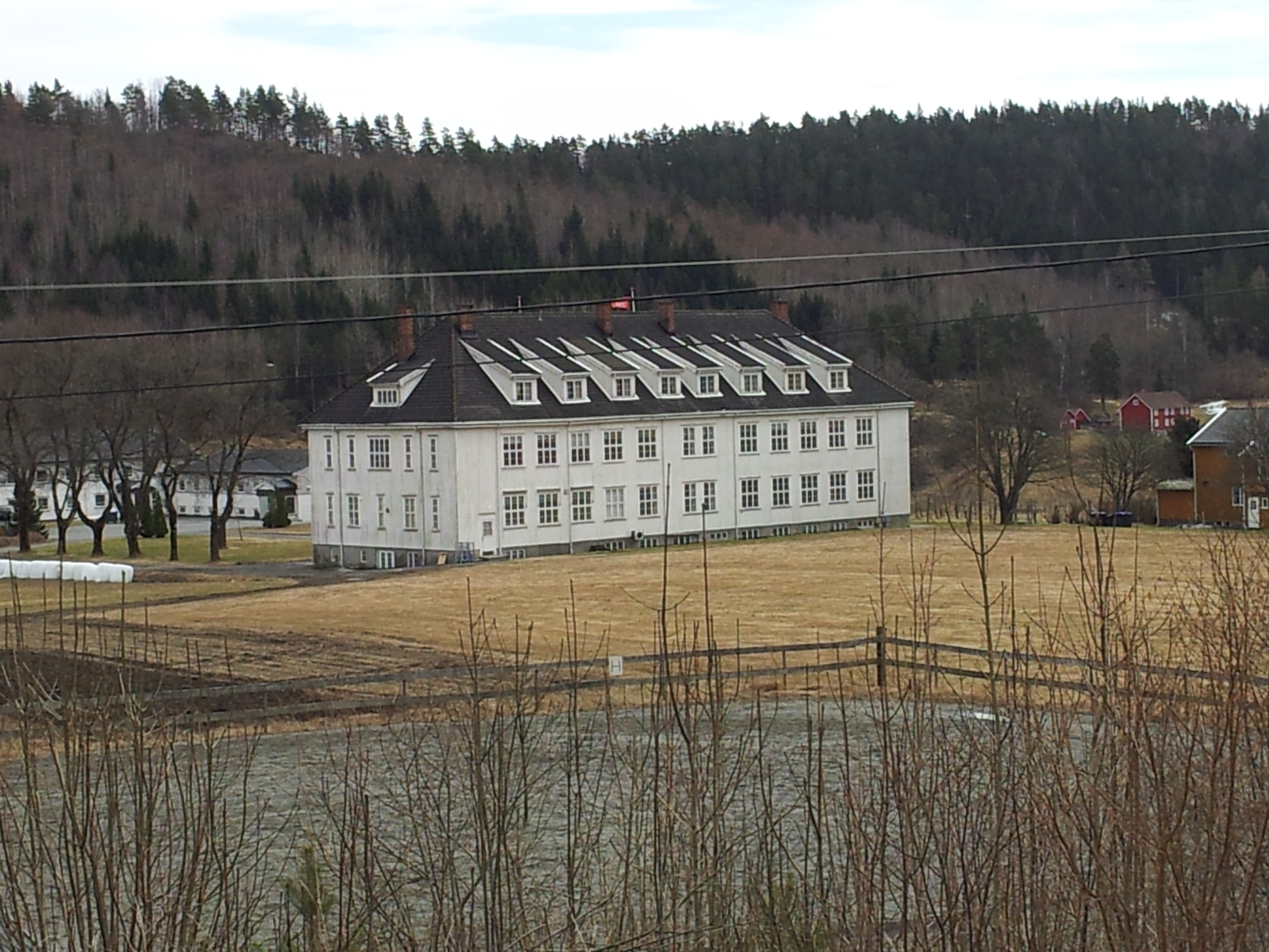 Holt Landbruksskole